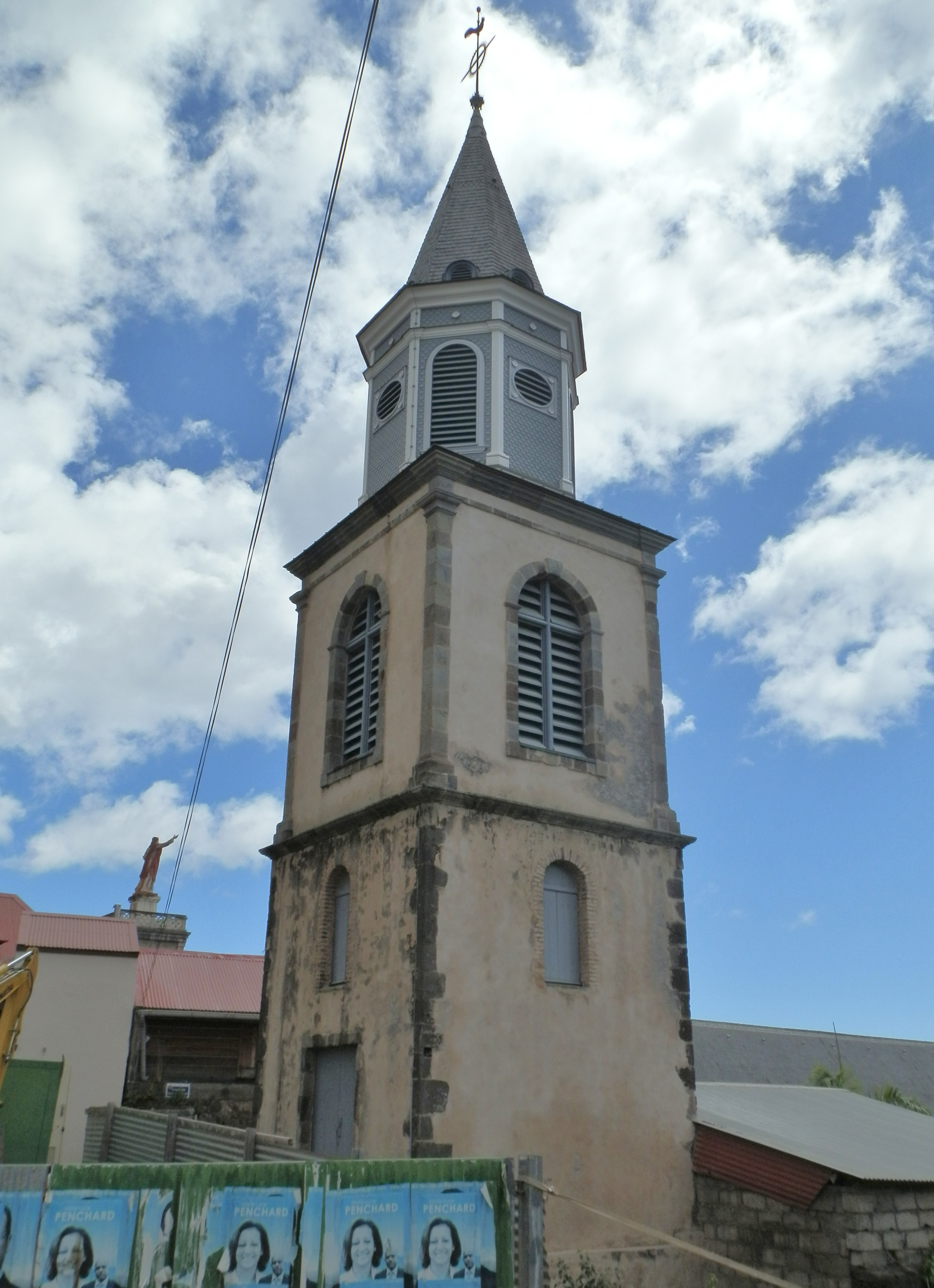 Cathédrale Notre-Dame de Guadeloupe, Classé, 1975 et 2006) .